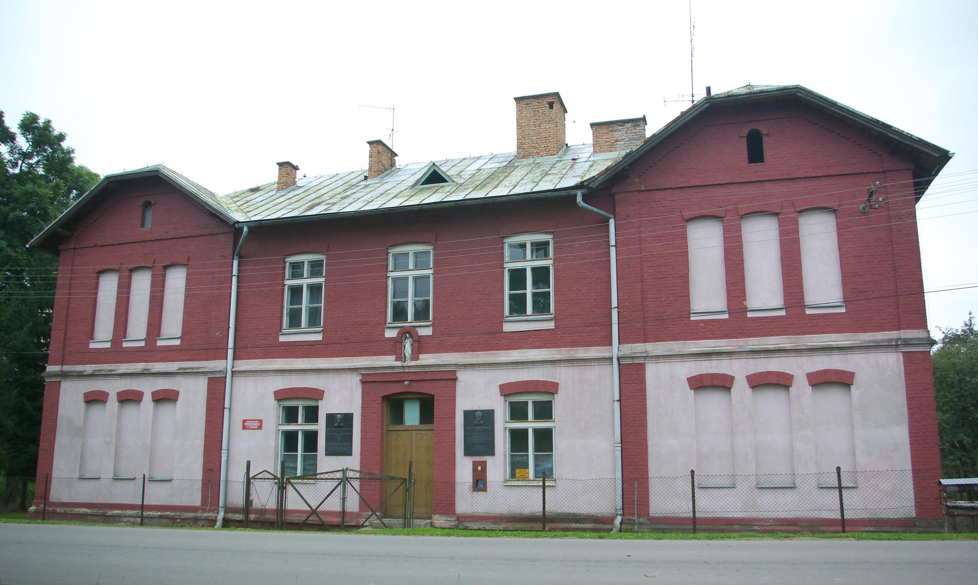 Była szkoła w Jaćmierzu. Obecnie Samorządowe Przedszkole im. Władysława Jagiełły w Jaćmierzu